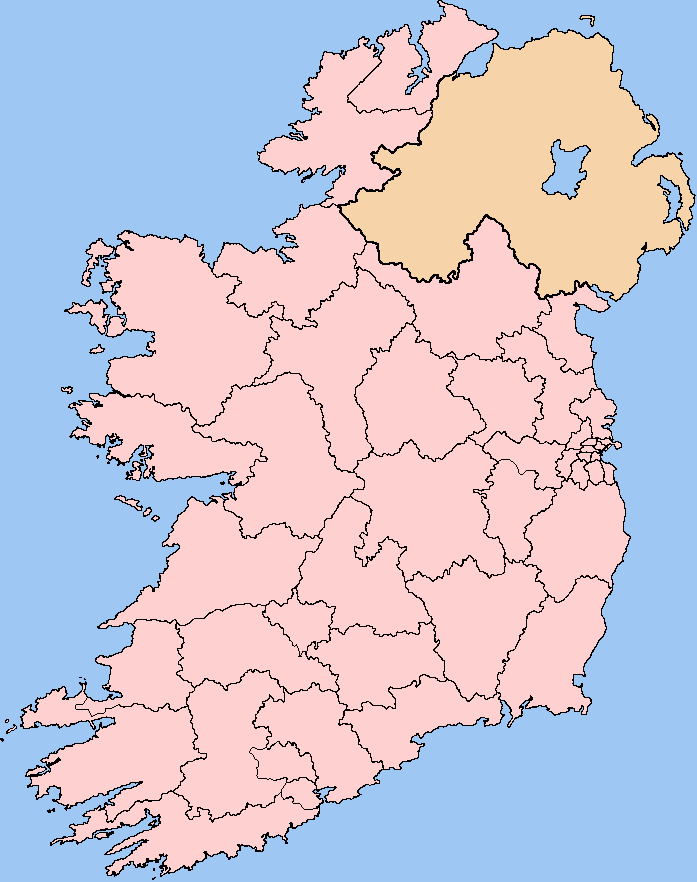 Dáil Éireann constituencies circa May 2007